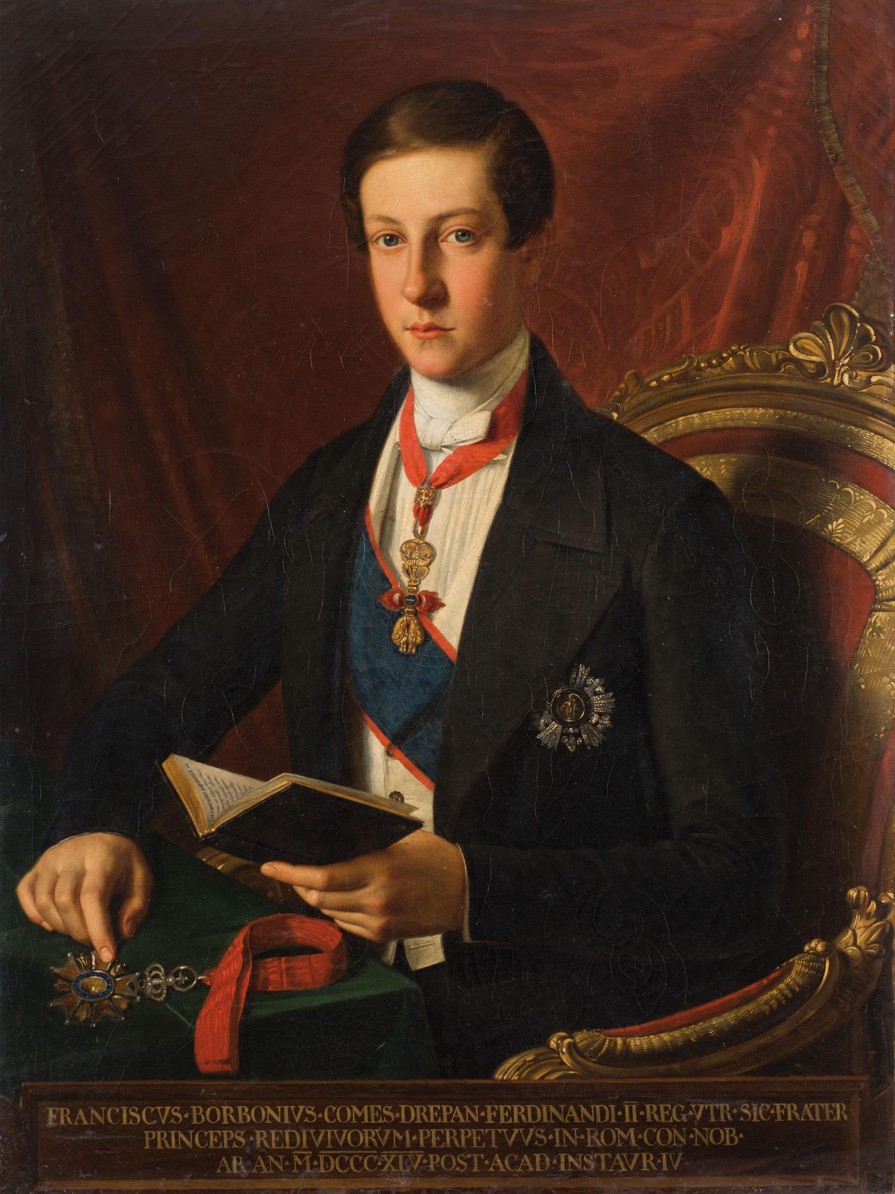 Ritratto di Francesco di Borbone, conte di Trapani